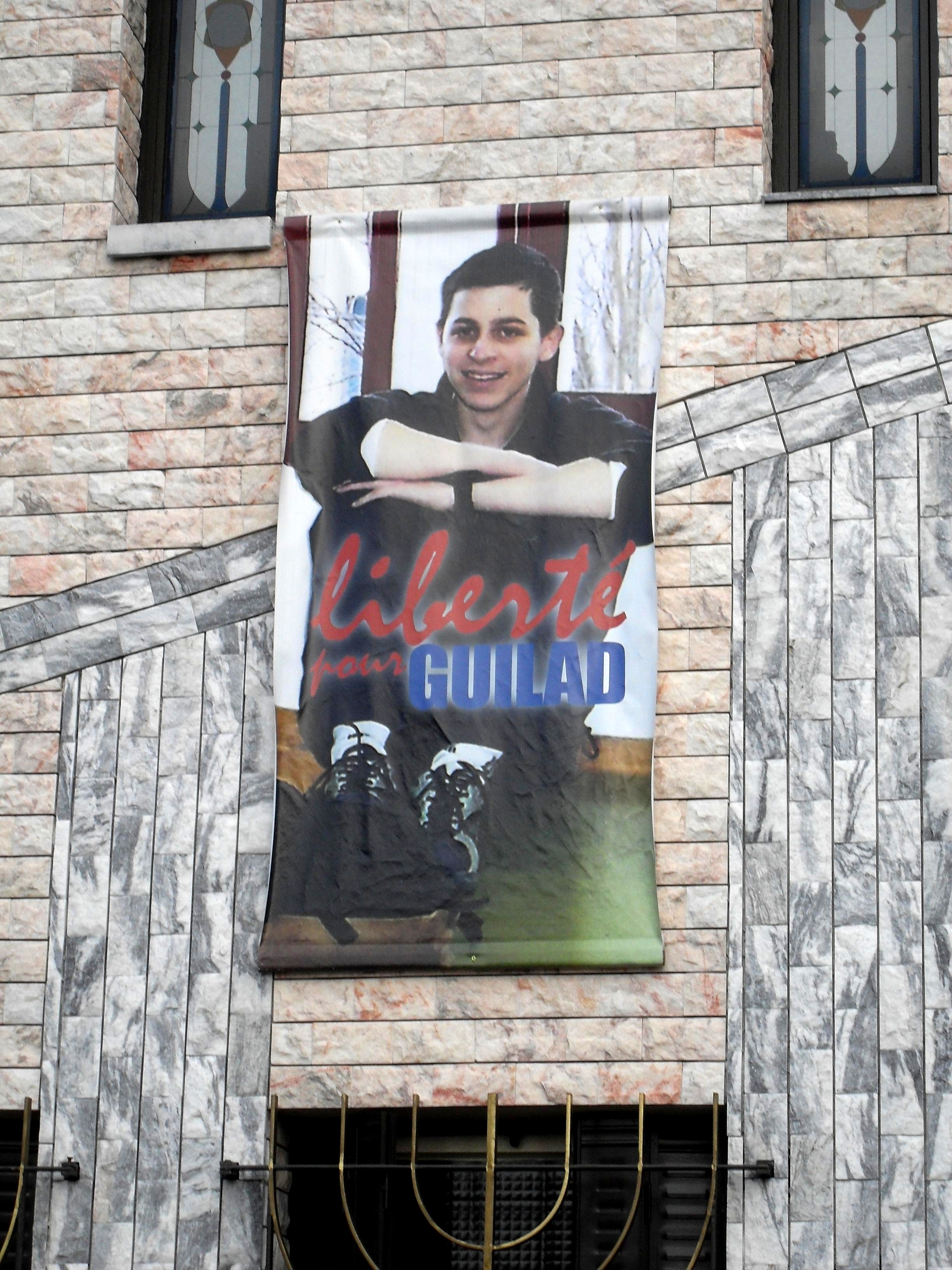 Créteil synagogue Liberté pour Guilad détail